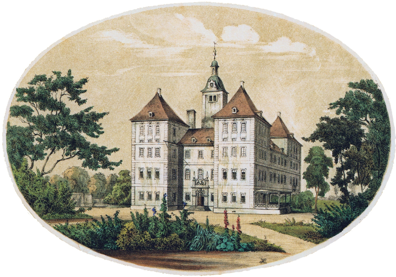 Schloss Rötha um 1860. Kolorierte Lithographie aus Album Sächsischer Rittergüter und Schlösser (Ausschnitt)